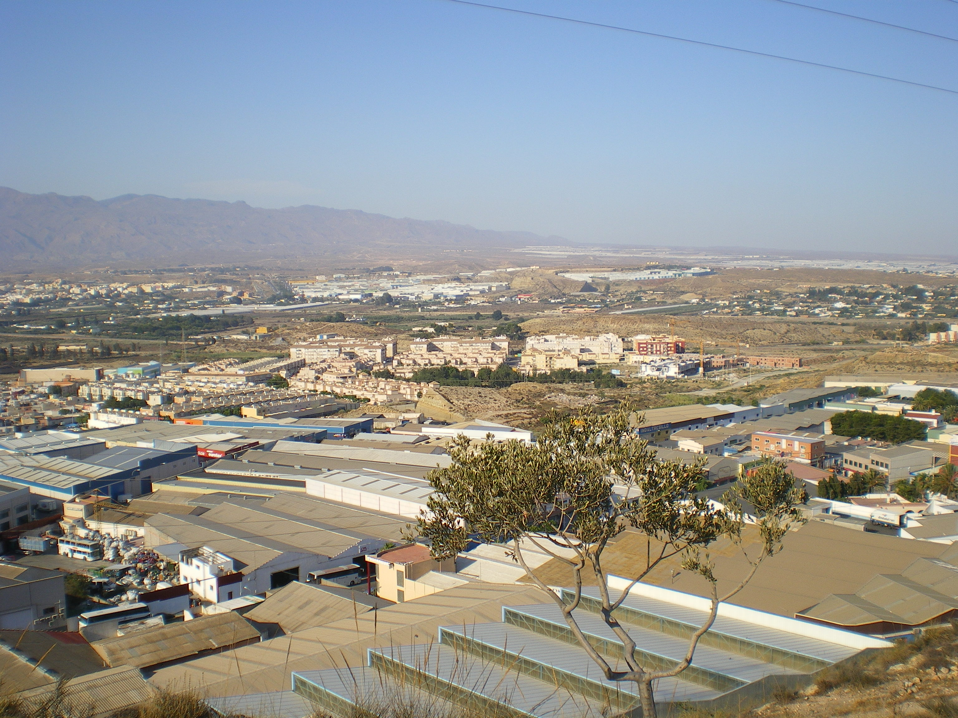 Fotografía del barrio de Villa Inés en Huércal de Almería, provincia de Almería, España, desde el cerro de Torre de Cárdenas.